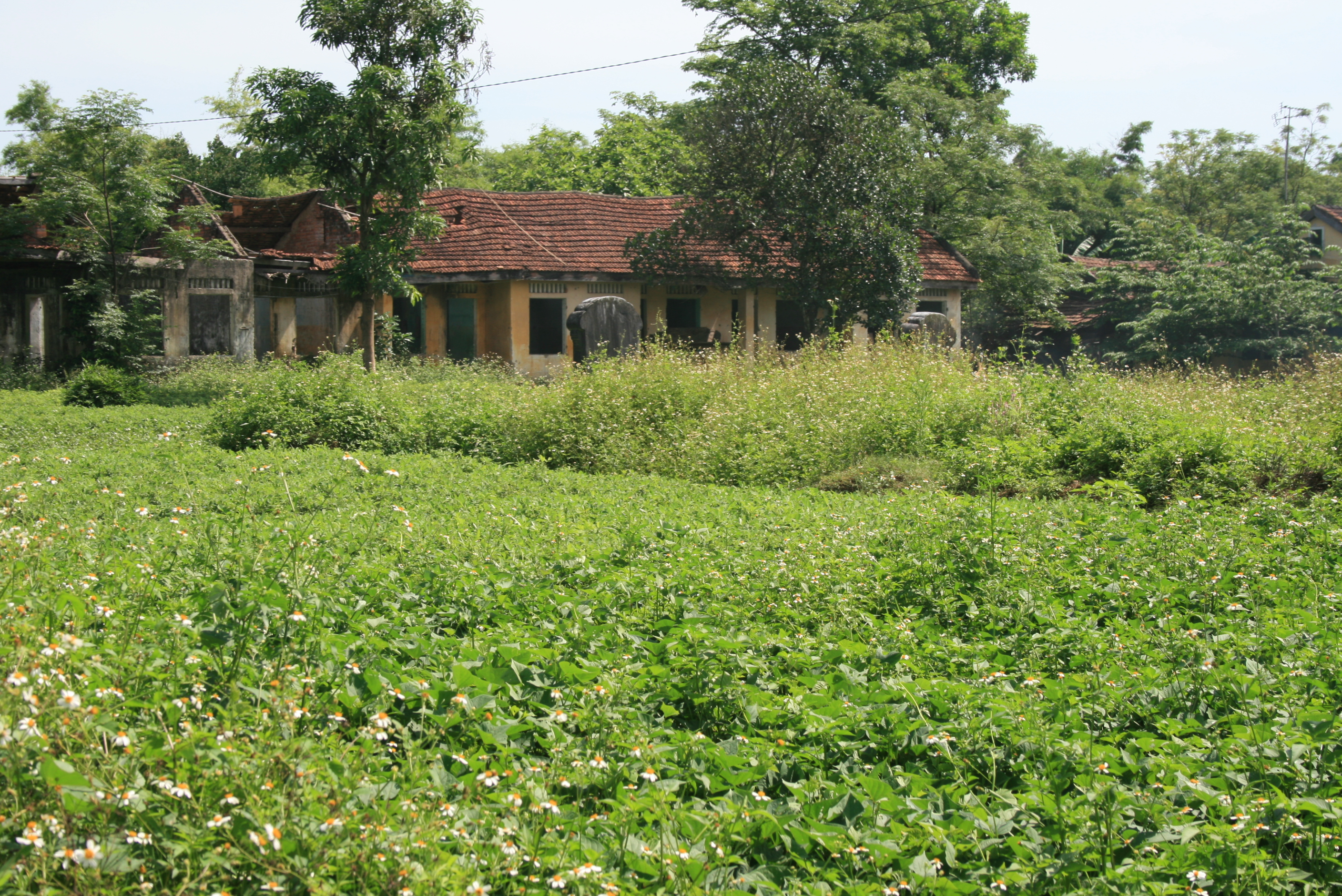 Bia đá tại Võ miếu Huế, chứng tích còn lại của một di tích trong quần thể di tích cố đô Huế.